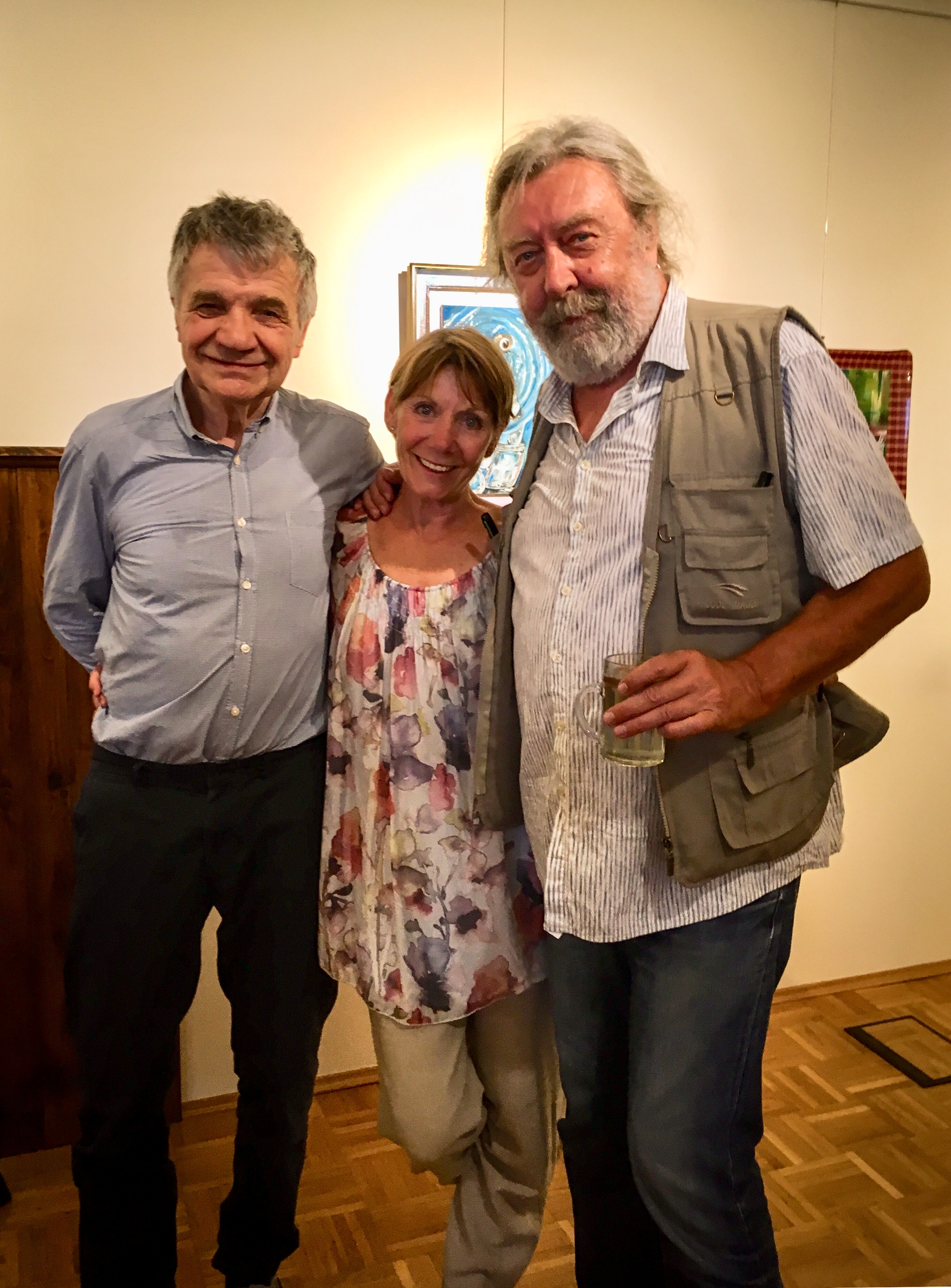 Vernissage von Itze Grünzweig im Stadtmuseum Klosterneuburg 2018 - (Klaus Rott, Erika Deutinger und Itze Grünzweig am 21.6.2018)